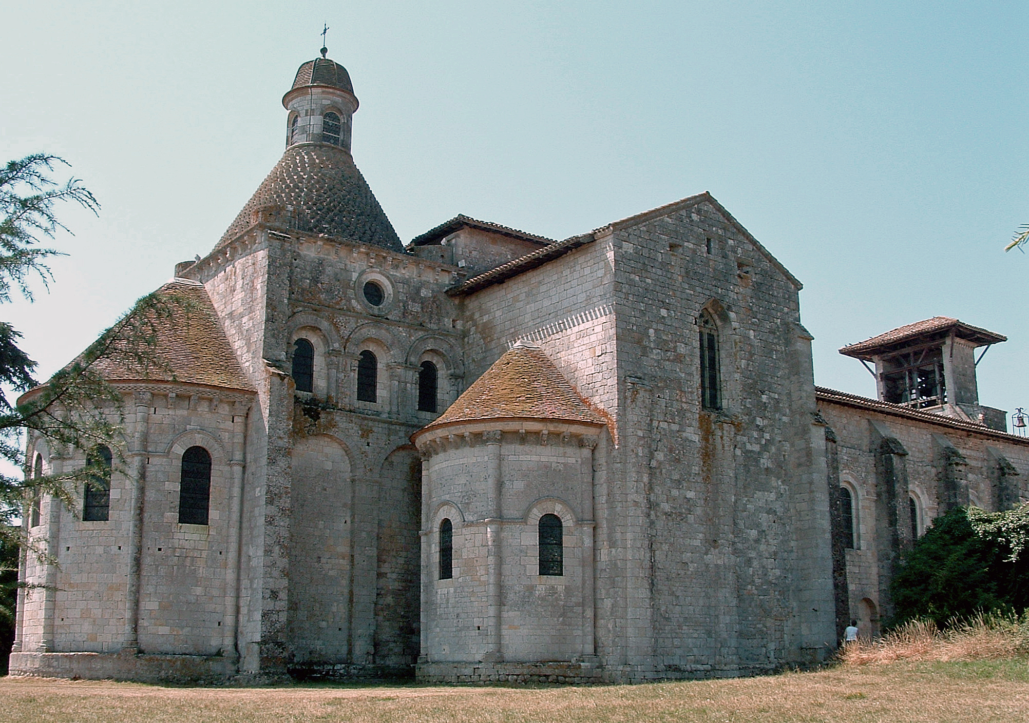 Moirax - Église Notre-Dame - Ensemble